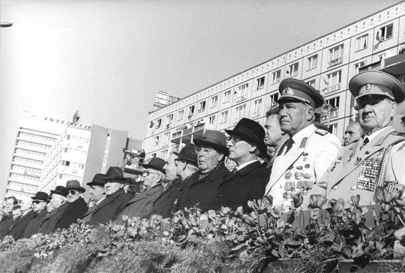 Berlin, 30. Jahrestag DDR-Gründung, Parade ADN-ZB Mittelstädt 7.10.79-Berlin: Ehrenparade Eine Ehrenparade der NVA zum 30. Jahrestag der DDR war am 7.10.79 in Berlin beeindruckender Auftakt des Jubiläumstages. - Auf der Ehrentribüne hatten Platz genommen: Erich Honecker, Generalsekretär des ZK der SED und Vorsitzender des Staatsrates der DDR, Leonid Breshnew, Generalsekretär des ZK der KPdSU und Vorsitzender des Präsidiums des Obersten Sowjets der UdSSR, sowie weitere Repräsentanten der Partei- und Staatsführung der DDR und ausländische Gäste. Abgebildete Personen: Breshnew, Leonid: Generalsekretär KP, Vorsitzender des Präsidiums des Obersten Sowjets, Sowjetunion (GND 118515136) Honecker, Erich: Staatsratsvorsitzender, Generalsekretär des ZK der SED, DDR (GND 118553399)